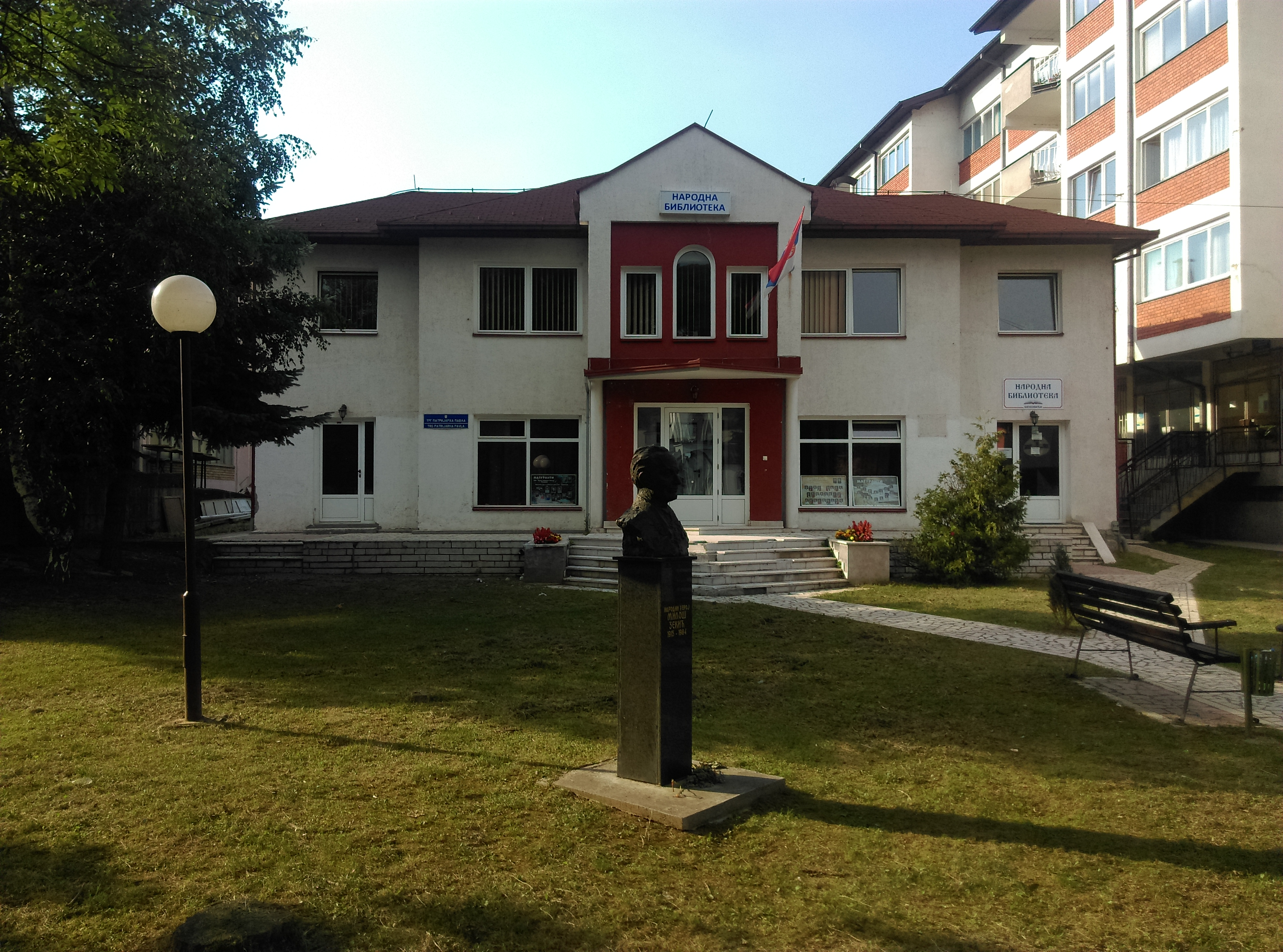 Српски (ћирилица): Народна библиотека у Општини Шековићи